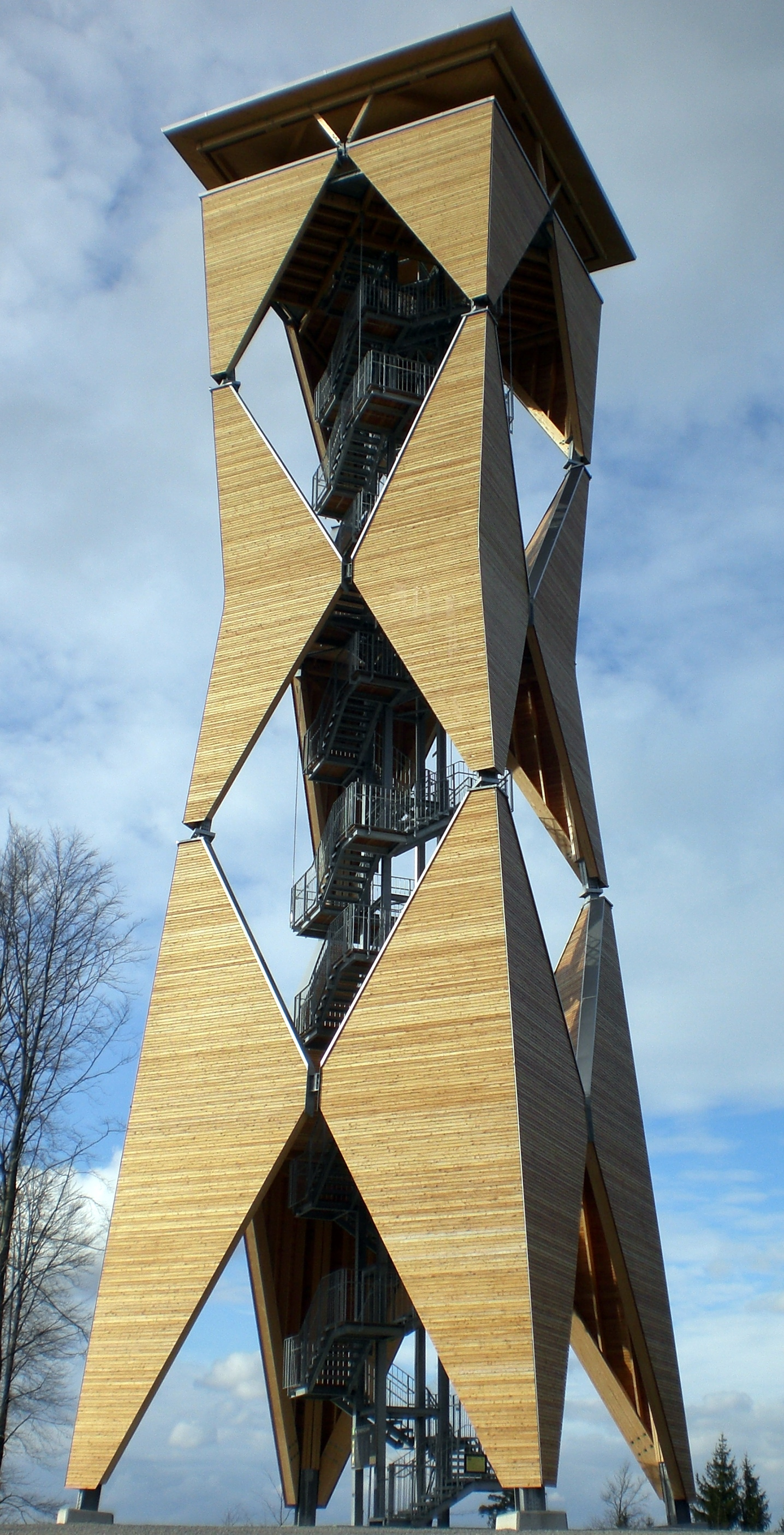 Der Altenbergturm in Sulzbach-Laufen, Gesamtansicht. Blickrichtung ungefähr nach Norden.